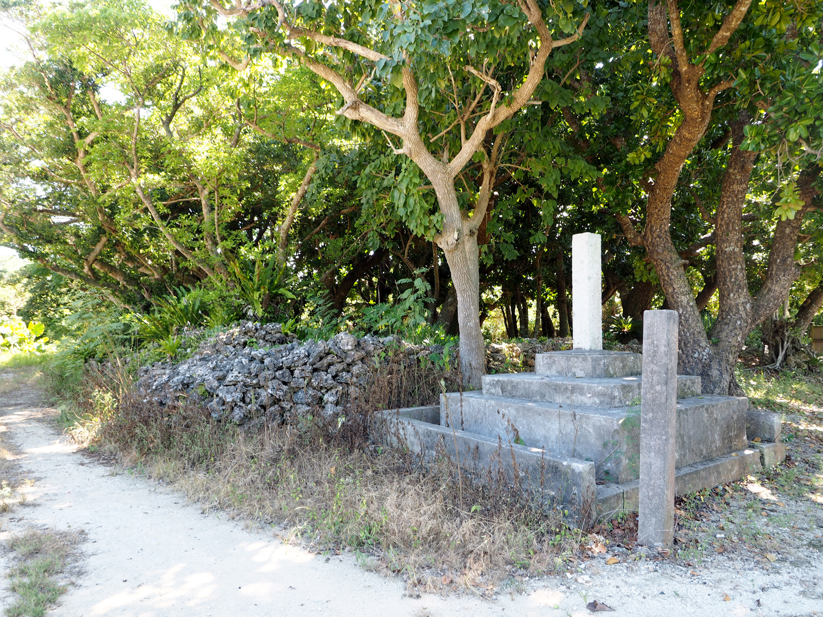 蔵元跡（沖縄県八重山郡竹富町竹富島）